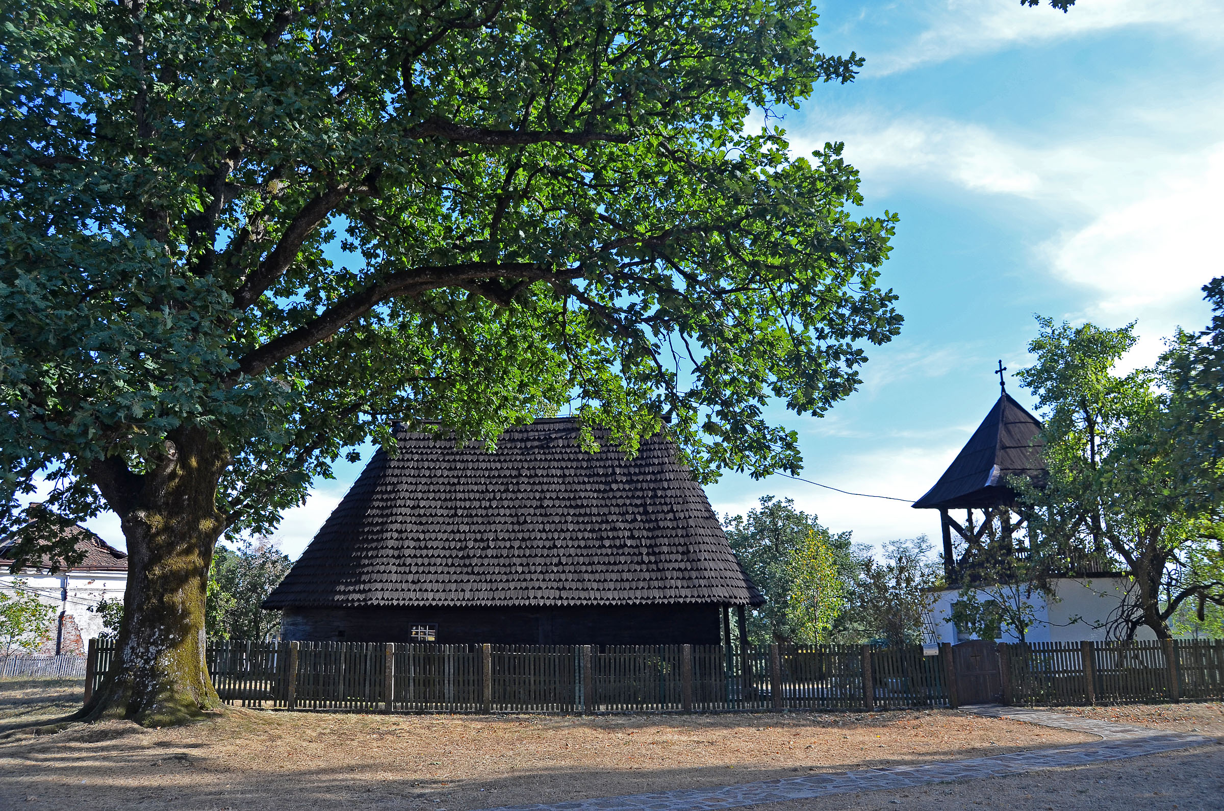 Црква брвнара и звоник у Љутовници, поглед са севера.